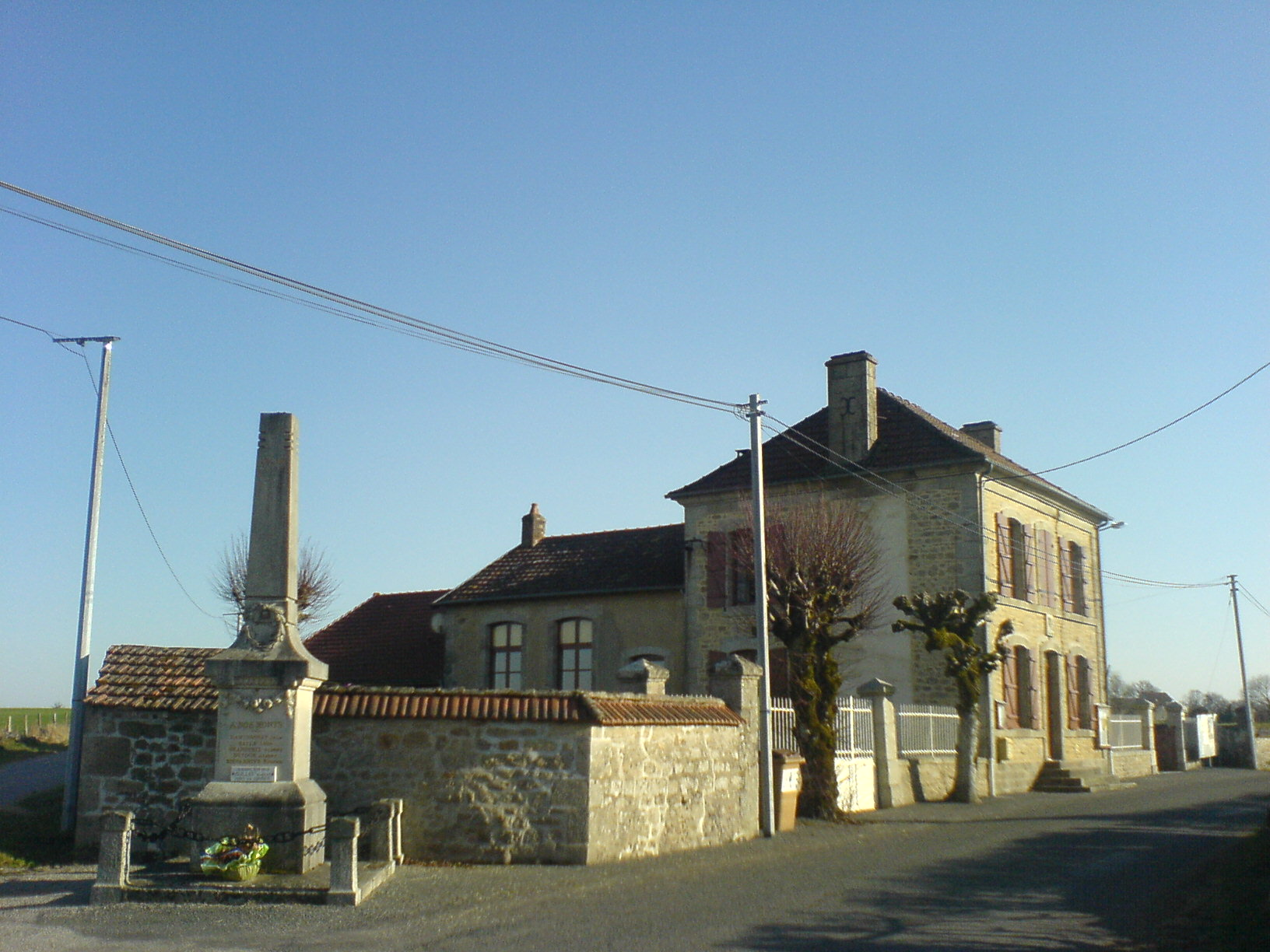 Mairie de Saint-Avit-le-Pauvre